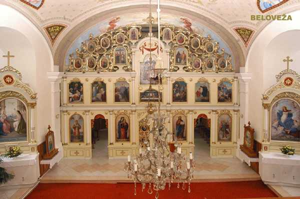 Church Sv.Michal Archanjel-Altar(Beloveza-Slovakia)